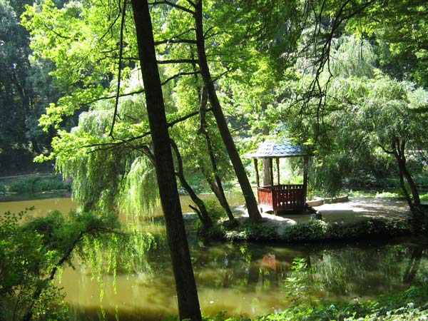 Краснокутський дендропарк: Краснокутський дендропарк_вид на альтанку на острові кохання